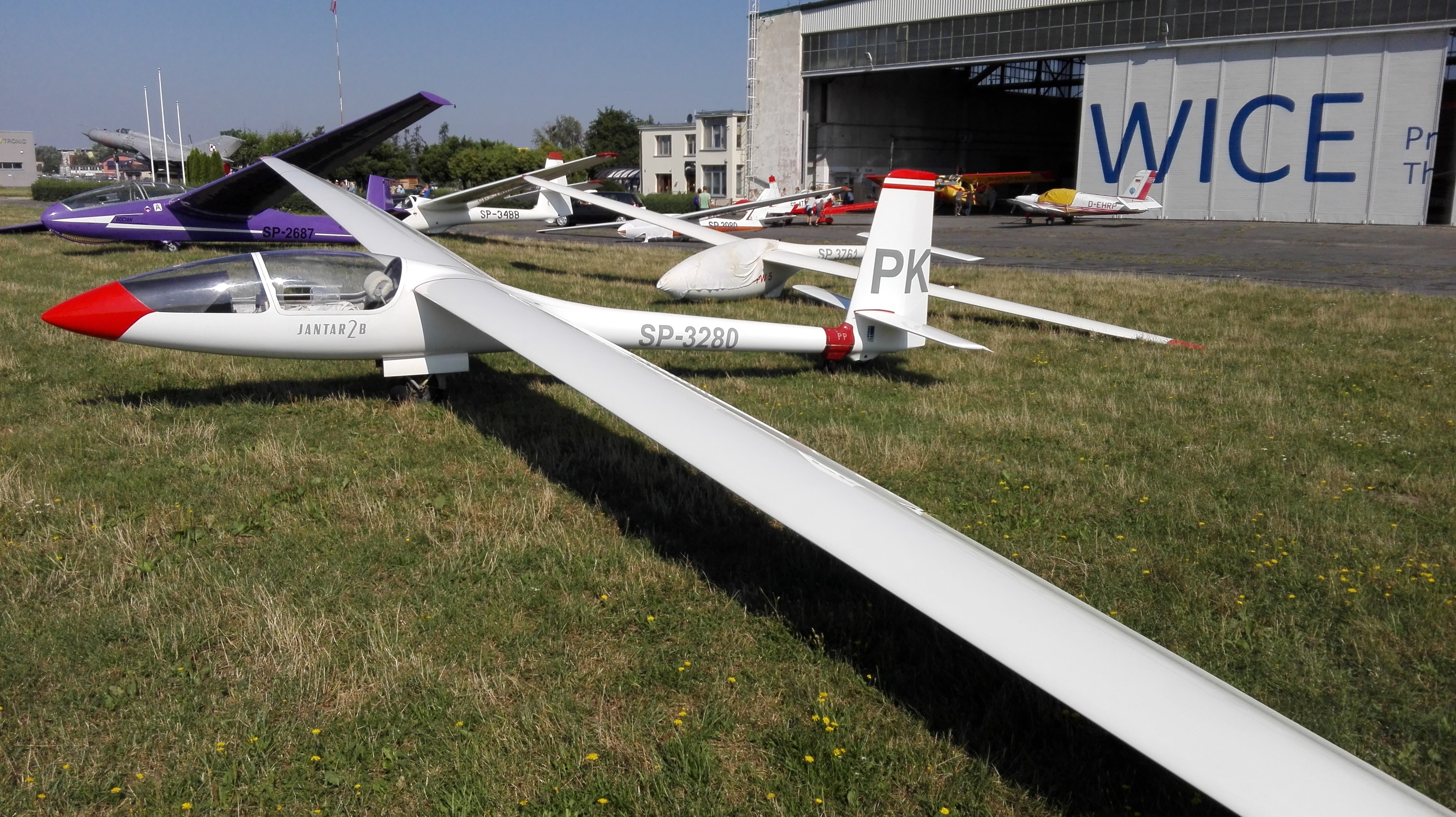 Statki powietrzne: SZD-42 Jantar 2 SP-3280 (PK), SZD-9 Bocian SP-2687, SZD-50 Puchacz SP-3488, PW-5 Smyk SP-3761, SZD-24 Foka 4A — lotnisko Gliwice-Trynek